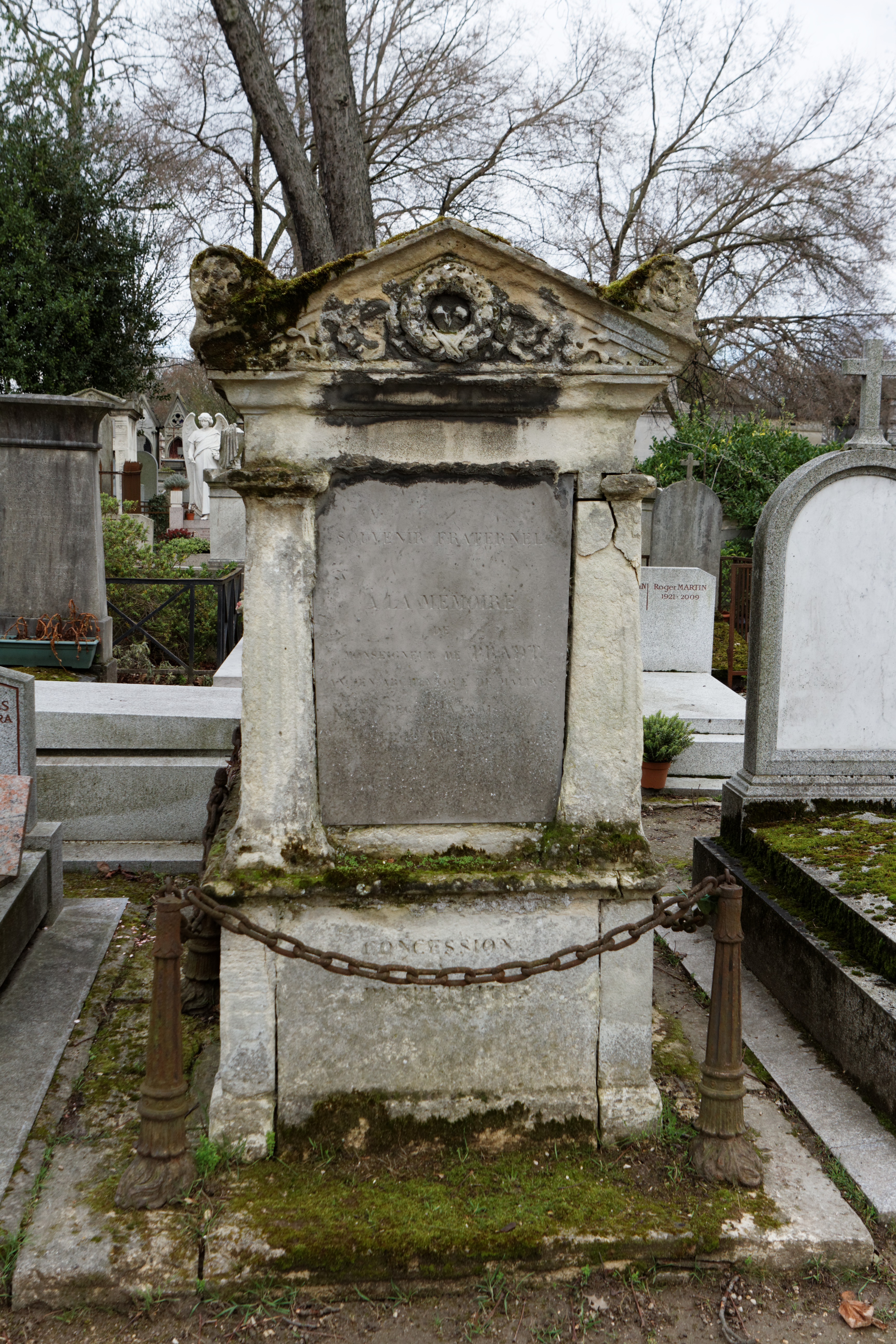 Sépulture de Dominique Dufour de Pradt (1759-1837), diplomate et un historien des relations internationales.